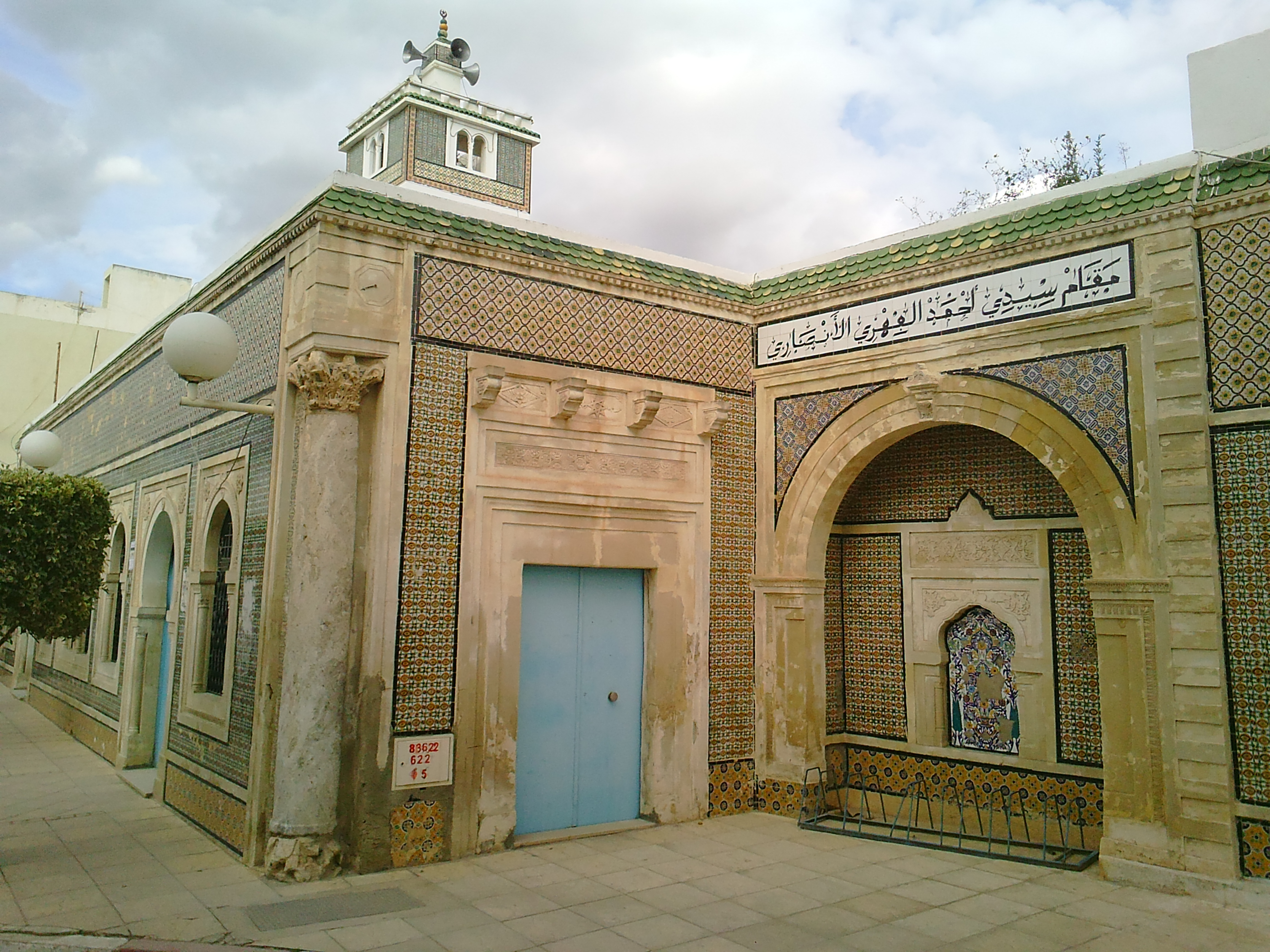 Sidi el Fehri, mausuoleum in Dar Chaabane, Tunsiia